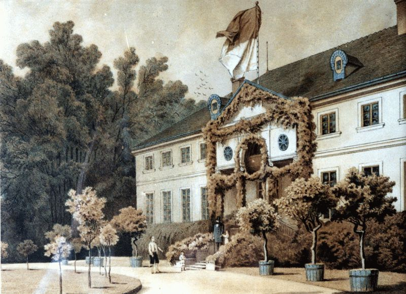 Rittergut Kieslingswalde, Kreis Görlitz, Provinz Schlesien